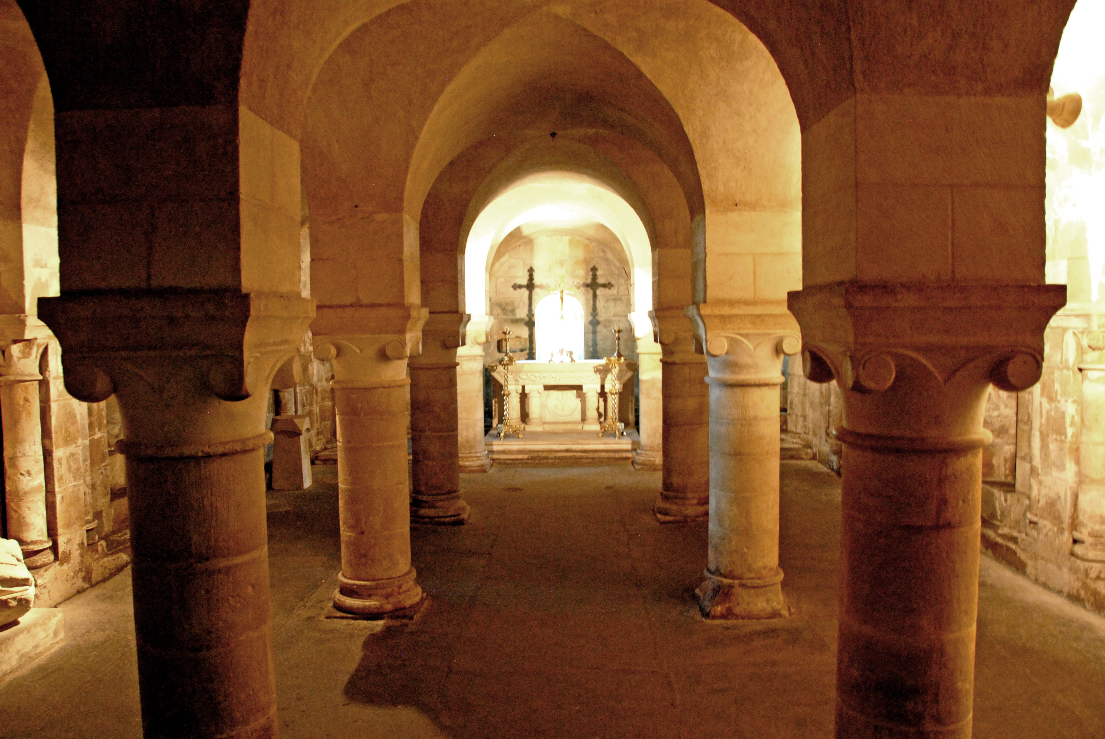 Vouvant, Krypta